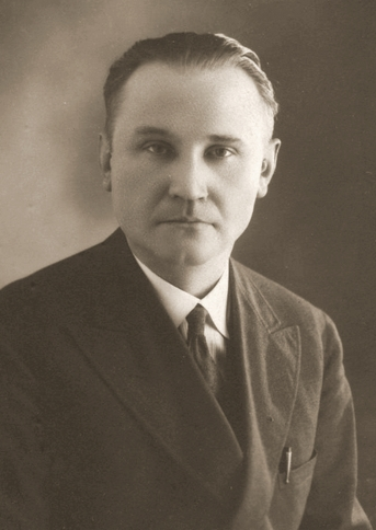 Stanisław Kara jako konsul generalny Polski w Lille.